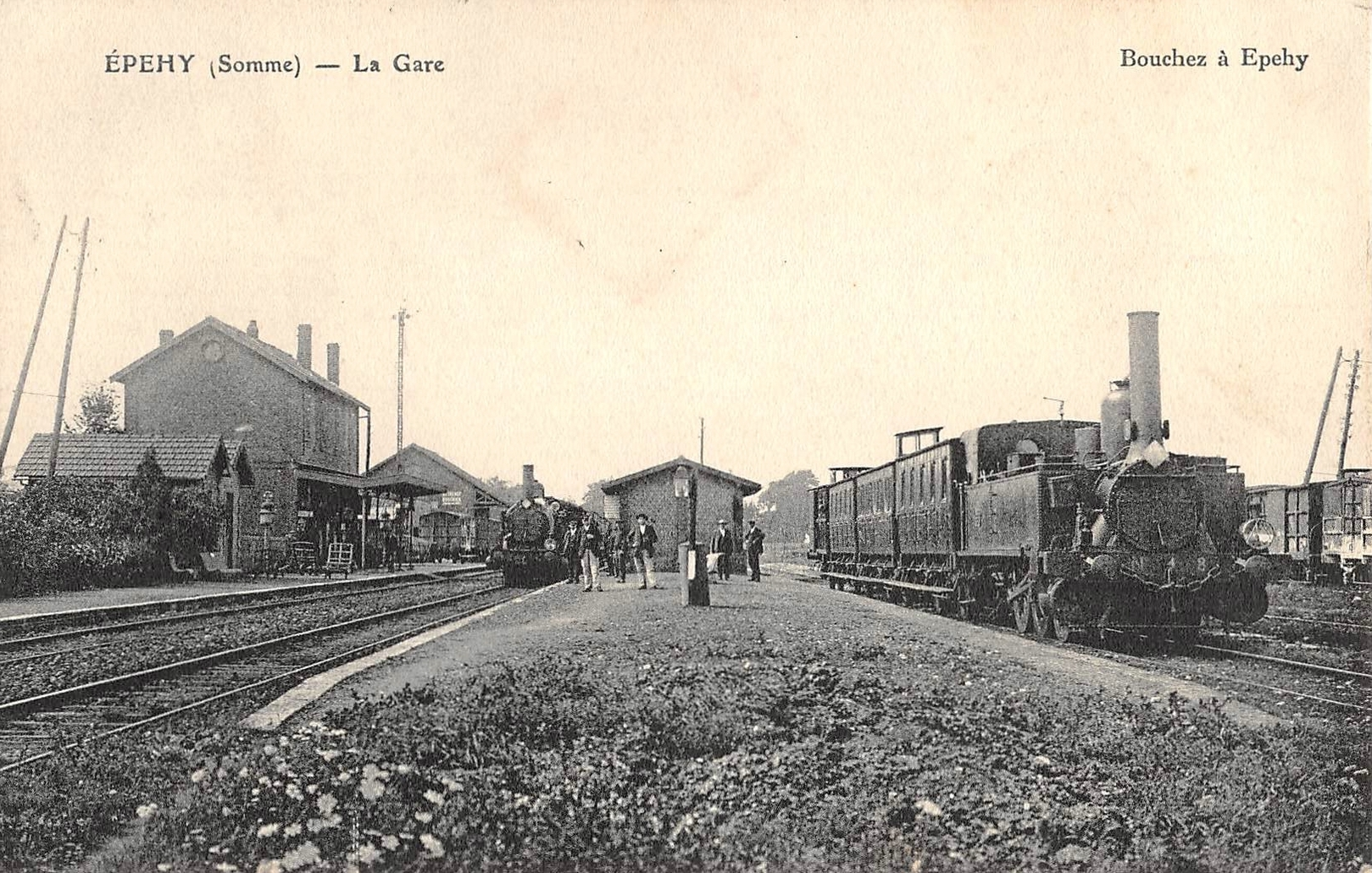 La gare d'Epehy vers 1905.